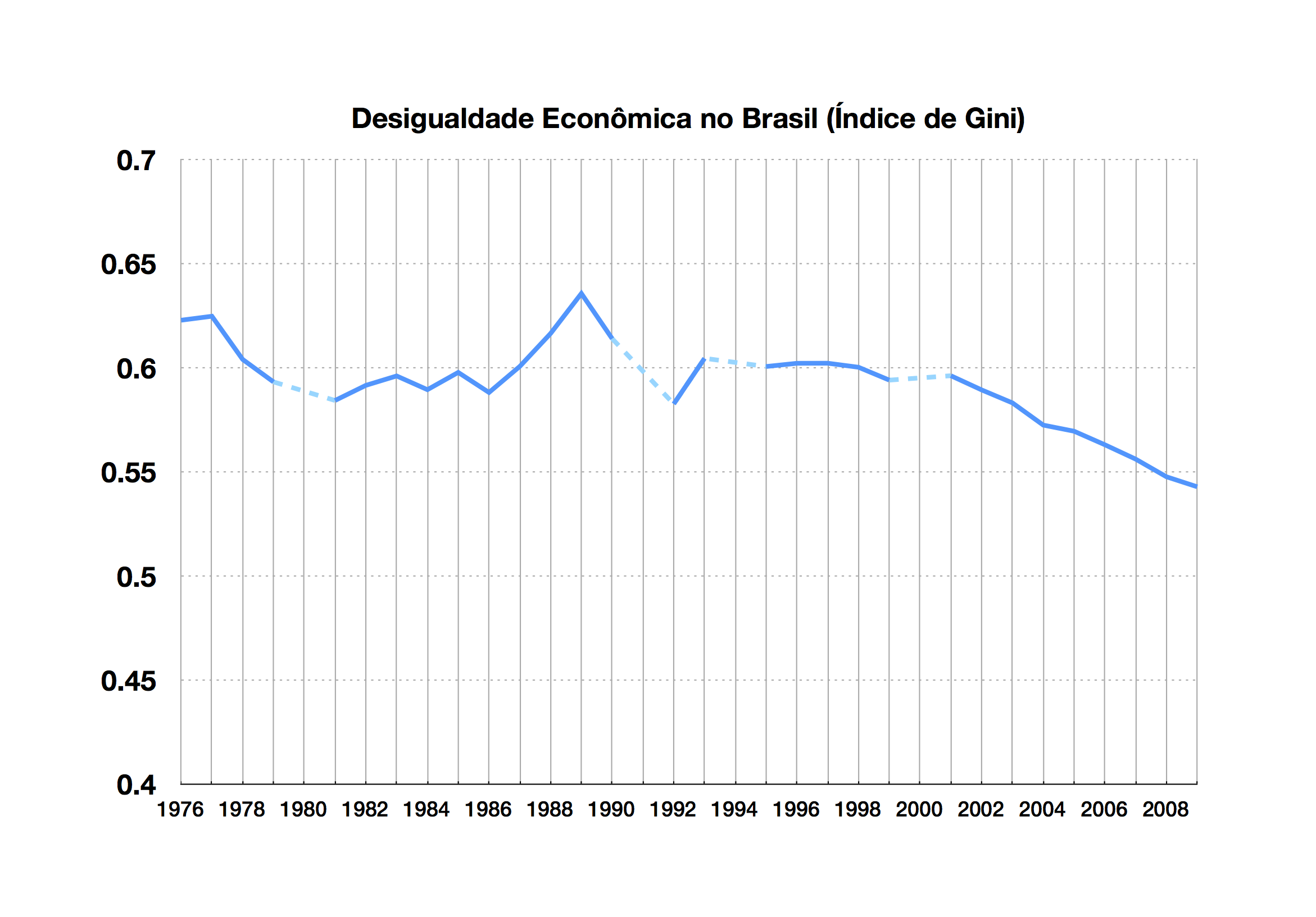 Histórico do índice Gini no Brasil, tentando apresentar da forma mais neutra possível. Fonte dos dados